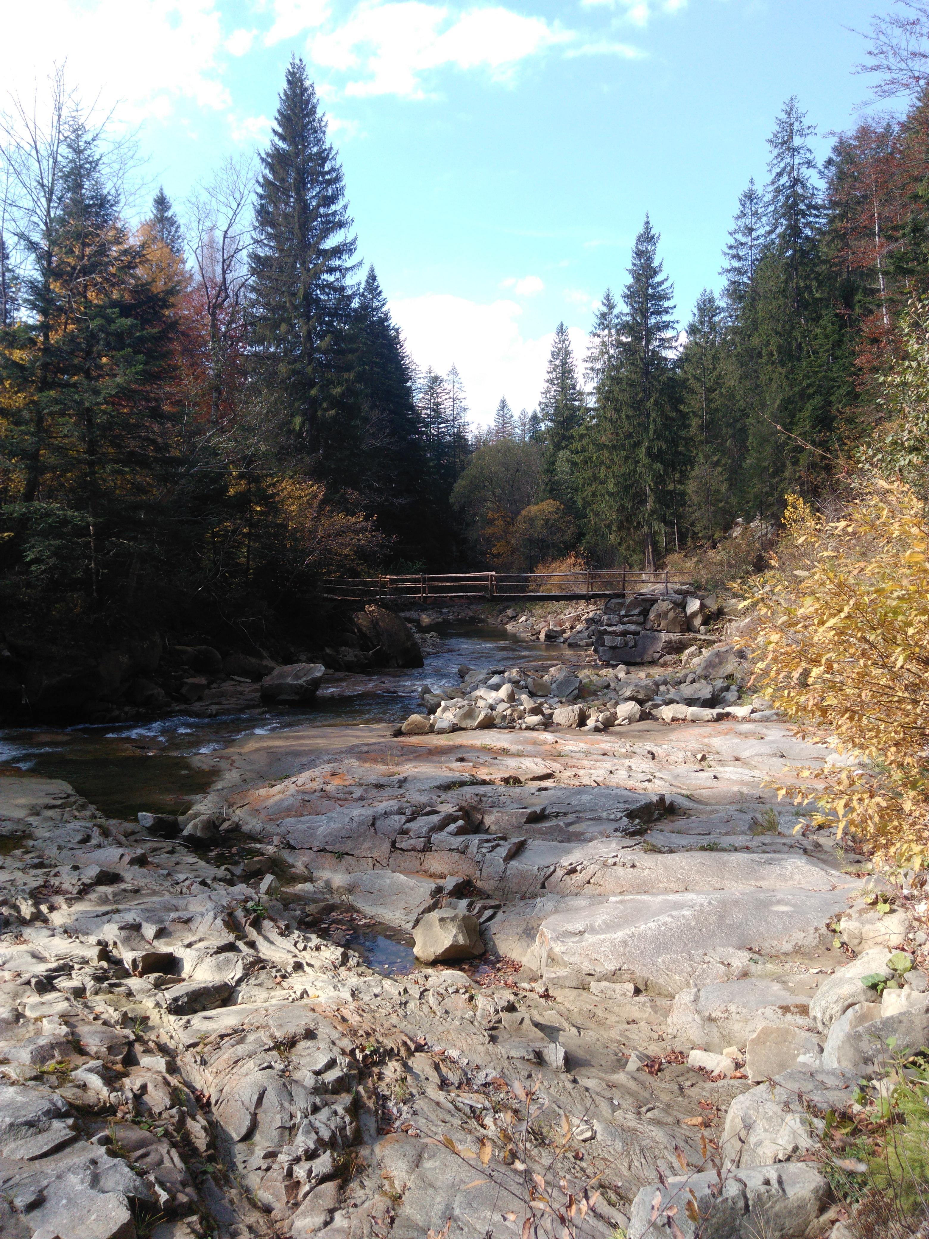 Прутець Чемегівський в середній течії в селі Микуличин.